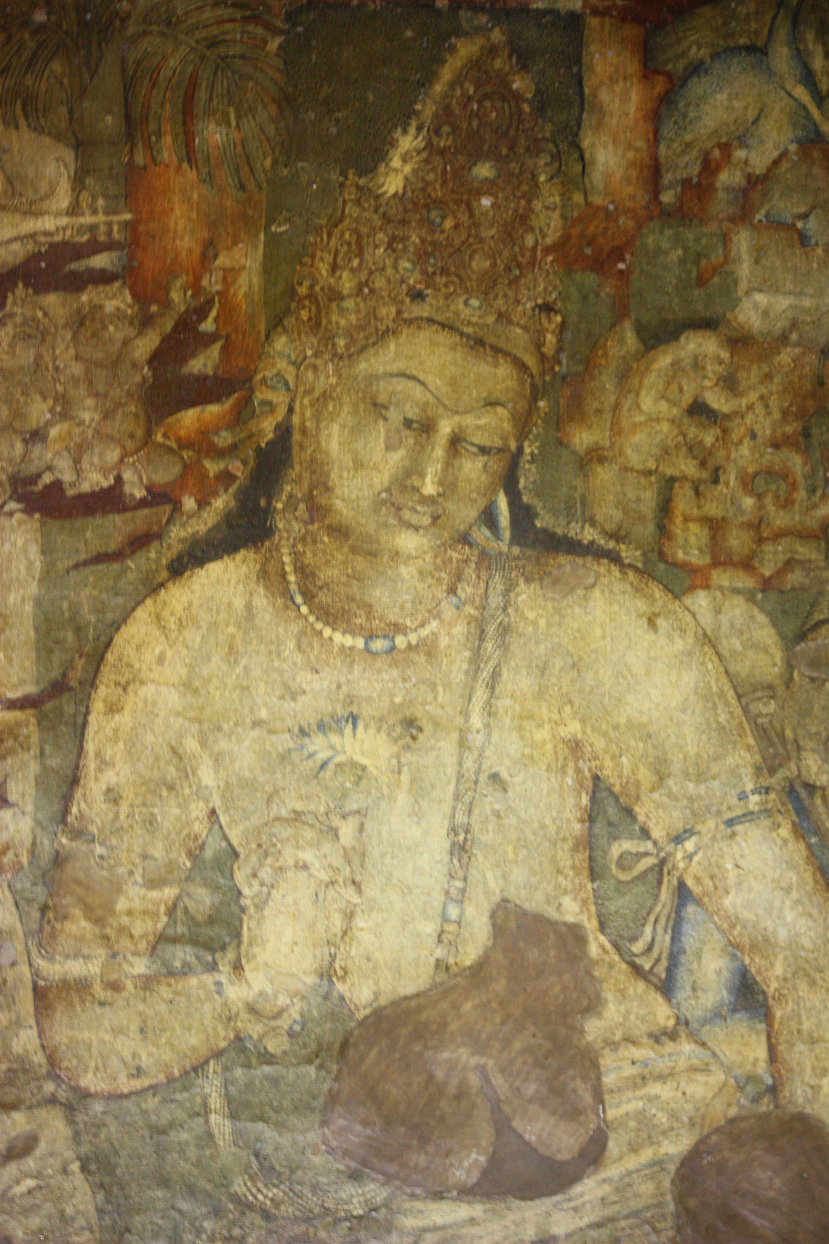 Ajanta, cave 1